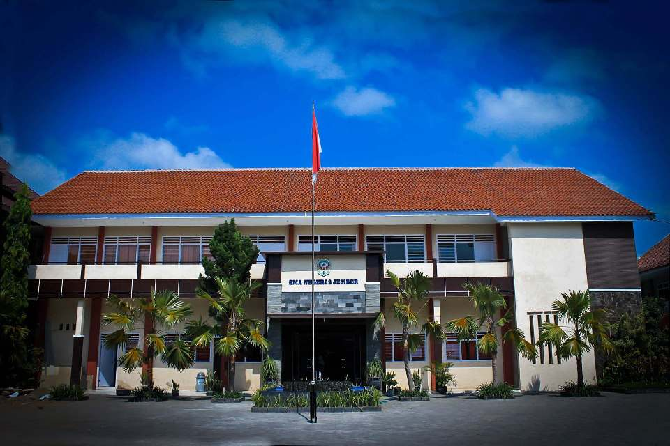 Ruang Guru SMA Negeri 2 Jember